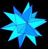 grand dodécaèdre étoilé capture d'un des applets LiveGraphics3D du site Autorisation après demande à l'auteur : "Concernant les images de solides, je considère qu'il n'y a pas de "droits" sur des sujets mathématiques. J'ai eu l'occasion d'utiliser des travaux réalisés par d'autres ; en général cela ne pose pas de problème dans la mesure où l'on demande l'autorisation et cite ses sources ("to give credit" comme disent les anglophones). Vous pouvez donc utiliser sans problème les images de mon site." Merci à lui.